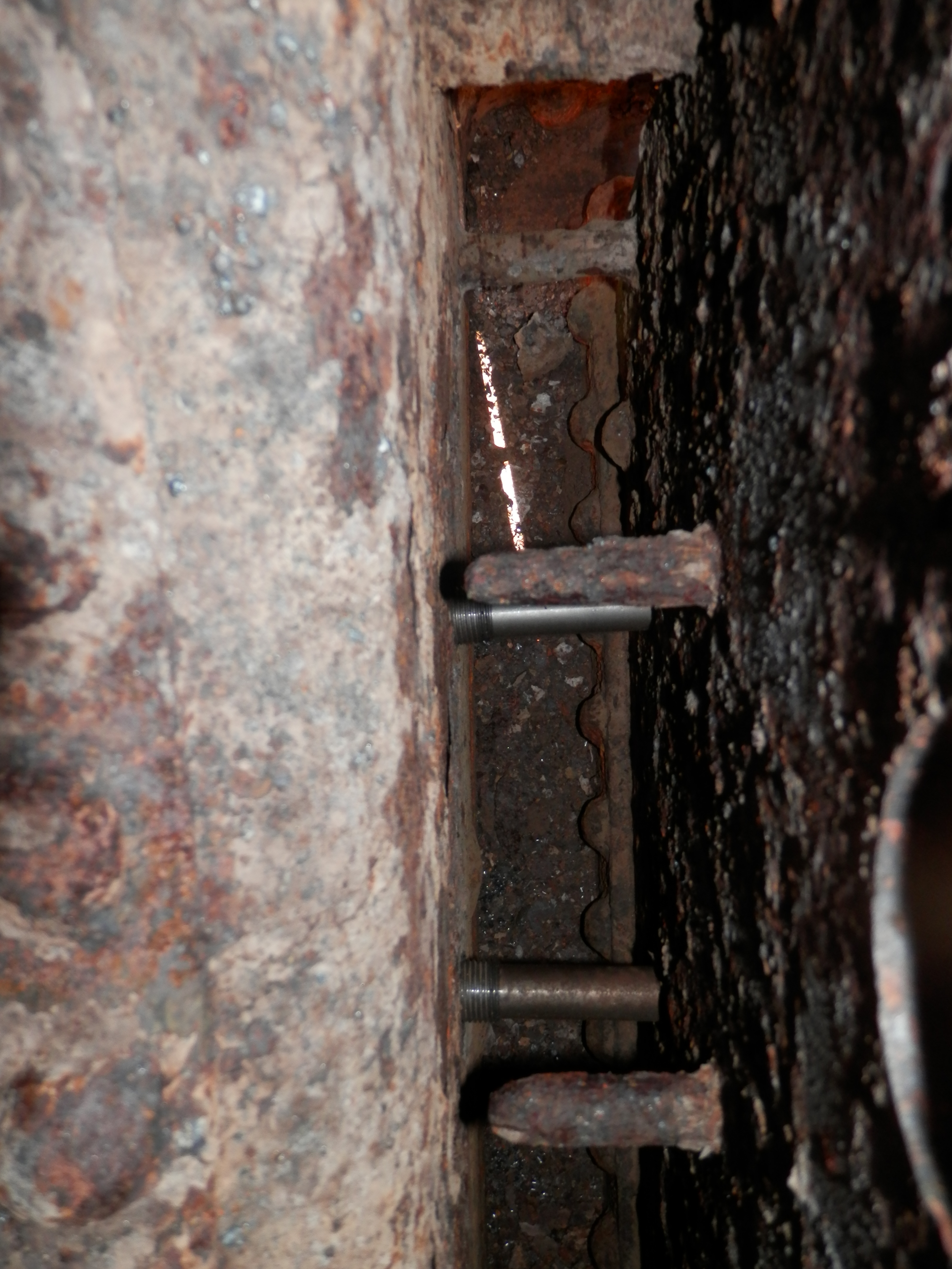 Höyrykattilan uusittuja ja uusimista odottavia sidepultteja